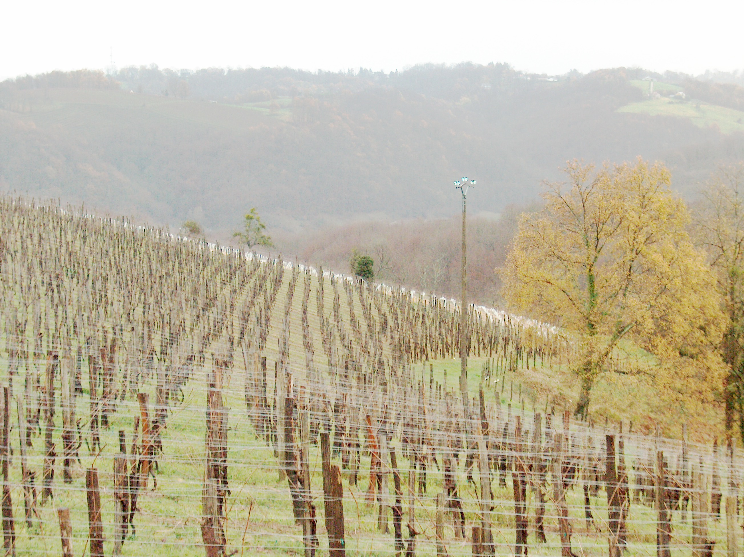 Vignoble du jurançon (Saint-Faust, Pyrénées-Atlantiques). Vue sur les côteaux de Jurançon. Inclinaison au sud. La vigne est déjà taillée.